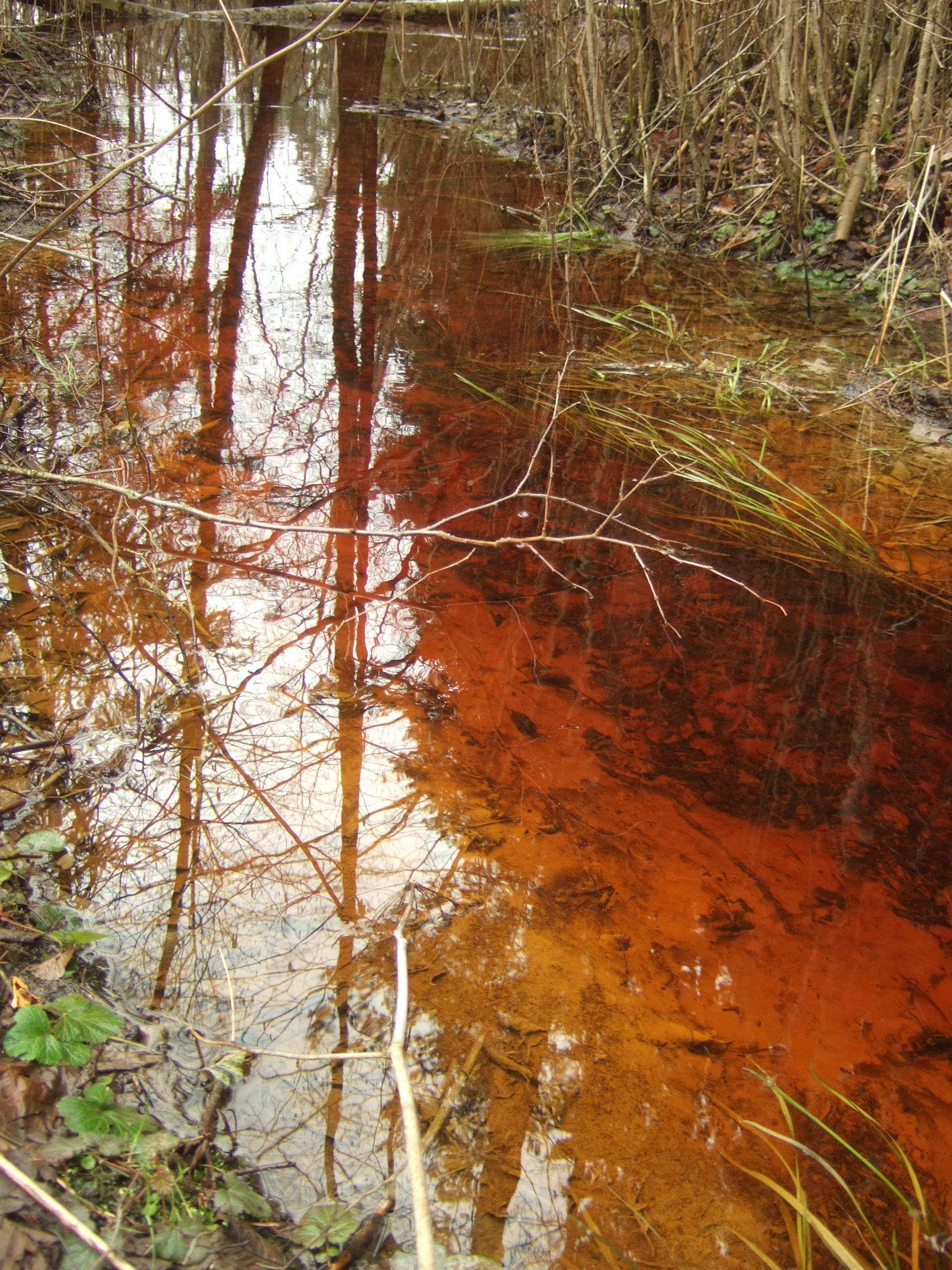 Raudonosios balos upelis